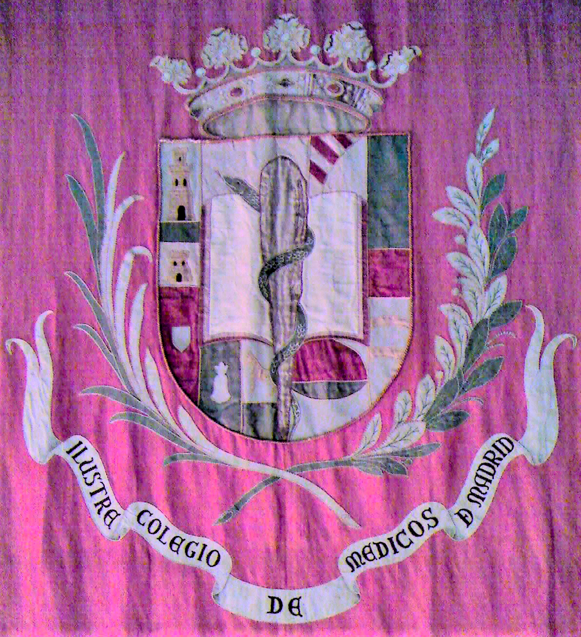 Repostero con el escudo del Ilustre Colegio Oficial de Médicos de Madrid (ICOMEM)